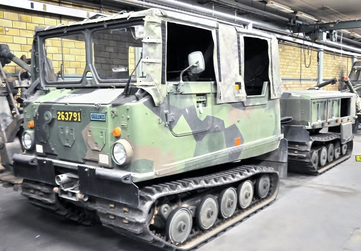 Pansarvärnsbandvagn 2062 (Pvpjbv 2062) är en vanlig Bv 206, men med öppet kapelltak och beväpnad med en Pansarvärnspjäs 1110. Fordonet var stommen i de svenska infanteribrigaderna typ IB 77.